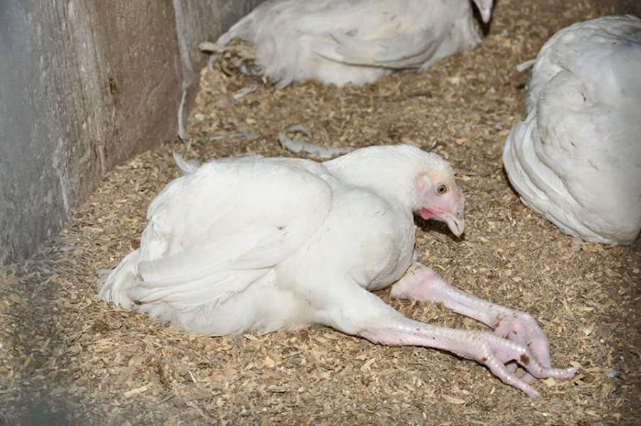 תרנגול עם רגליים מעוות שוכב בעלטה ב"לול חושך" בקיבוץ חפציבה. בלול חושך שוררת עלטה מוחלטת ללא שביב אור, בשיטה זאת התרנגולים גדלים מהר יותר.